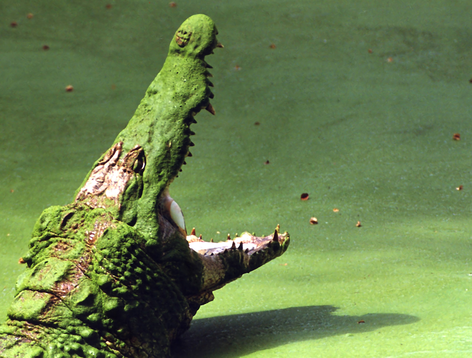 Crocodile, Kachikali, Bakau, The Gambia